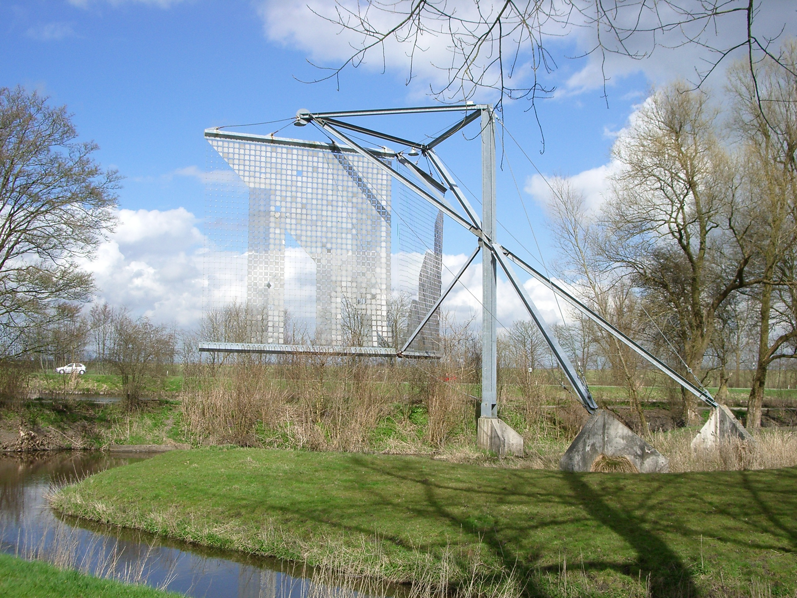 eigen foto